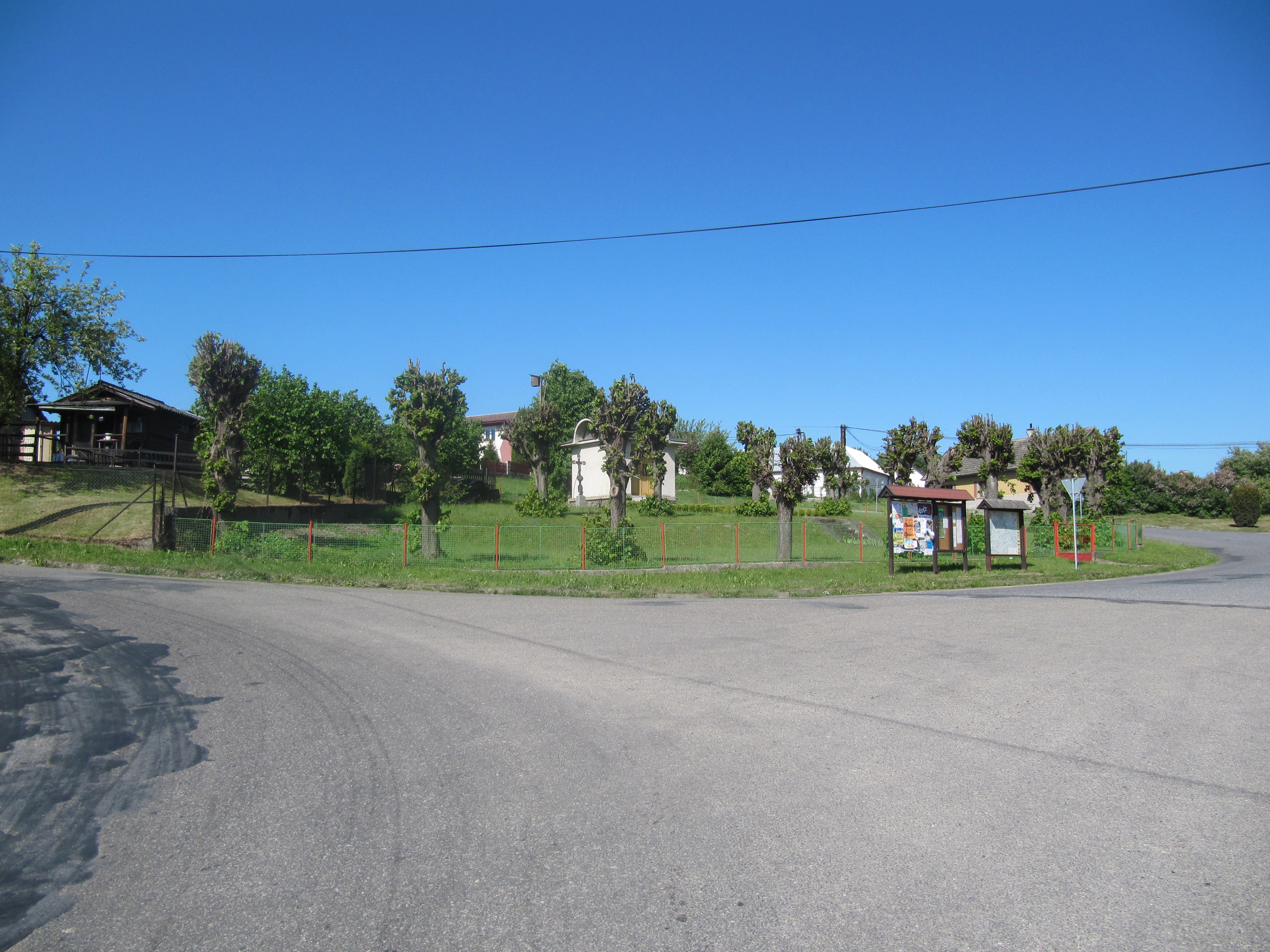 Bílkovice